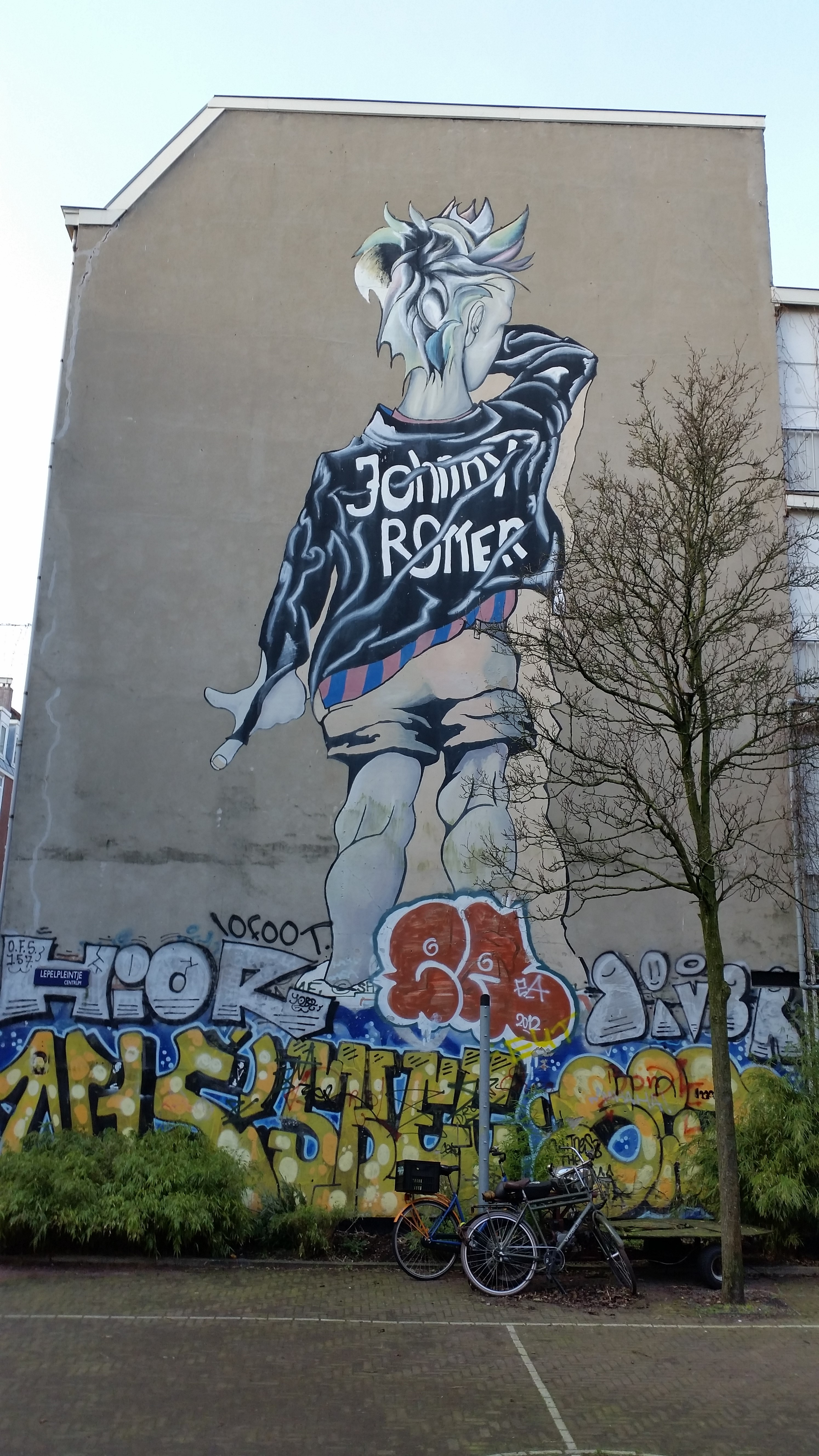 Impressie van de Lepelstraat, Amsterdam-Centrum in 2020